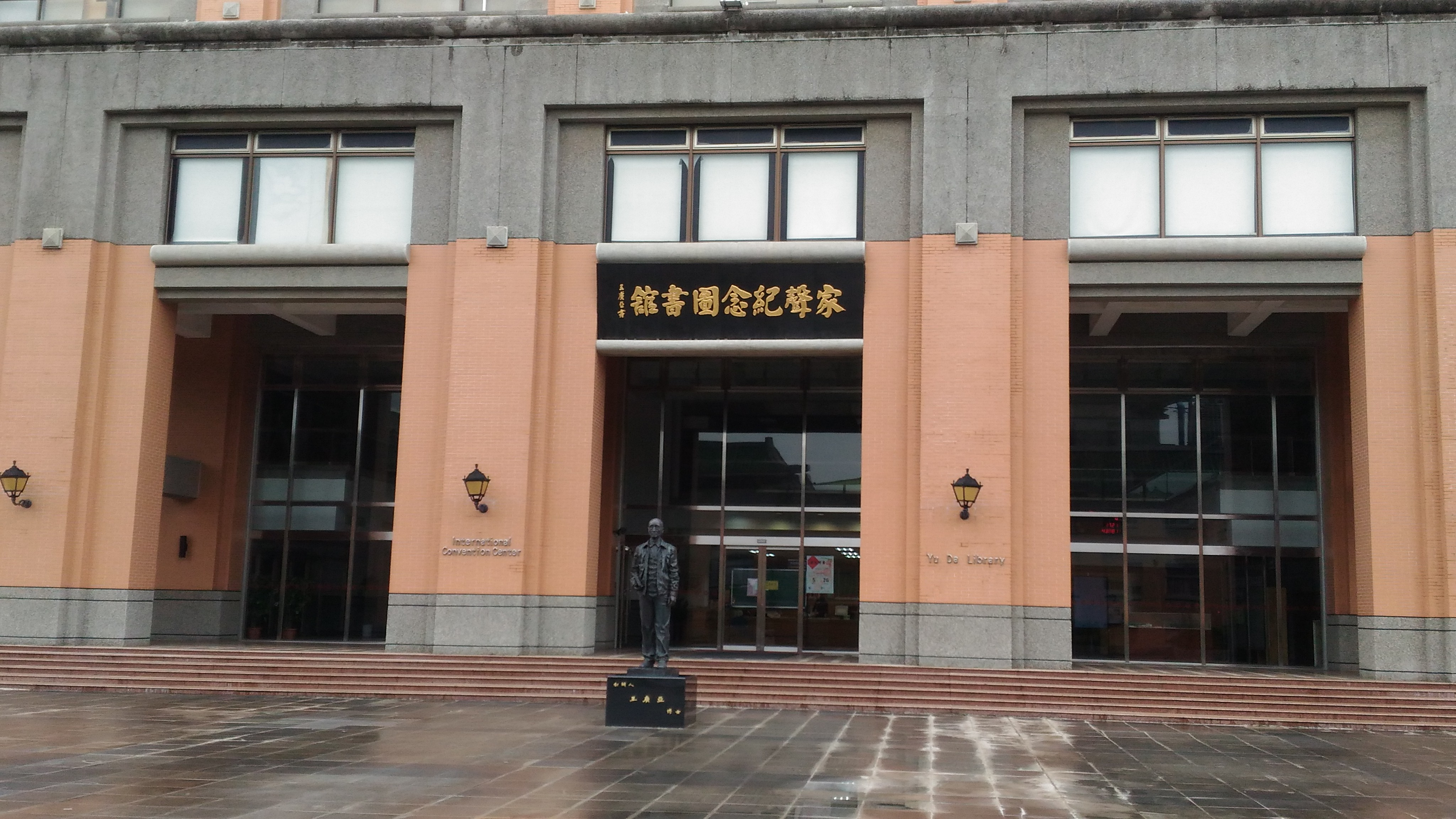 育達科技大學家聲紀念圖書館。